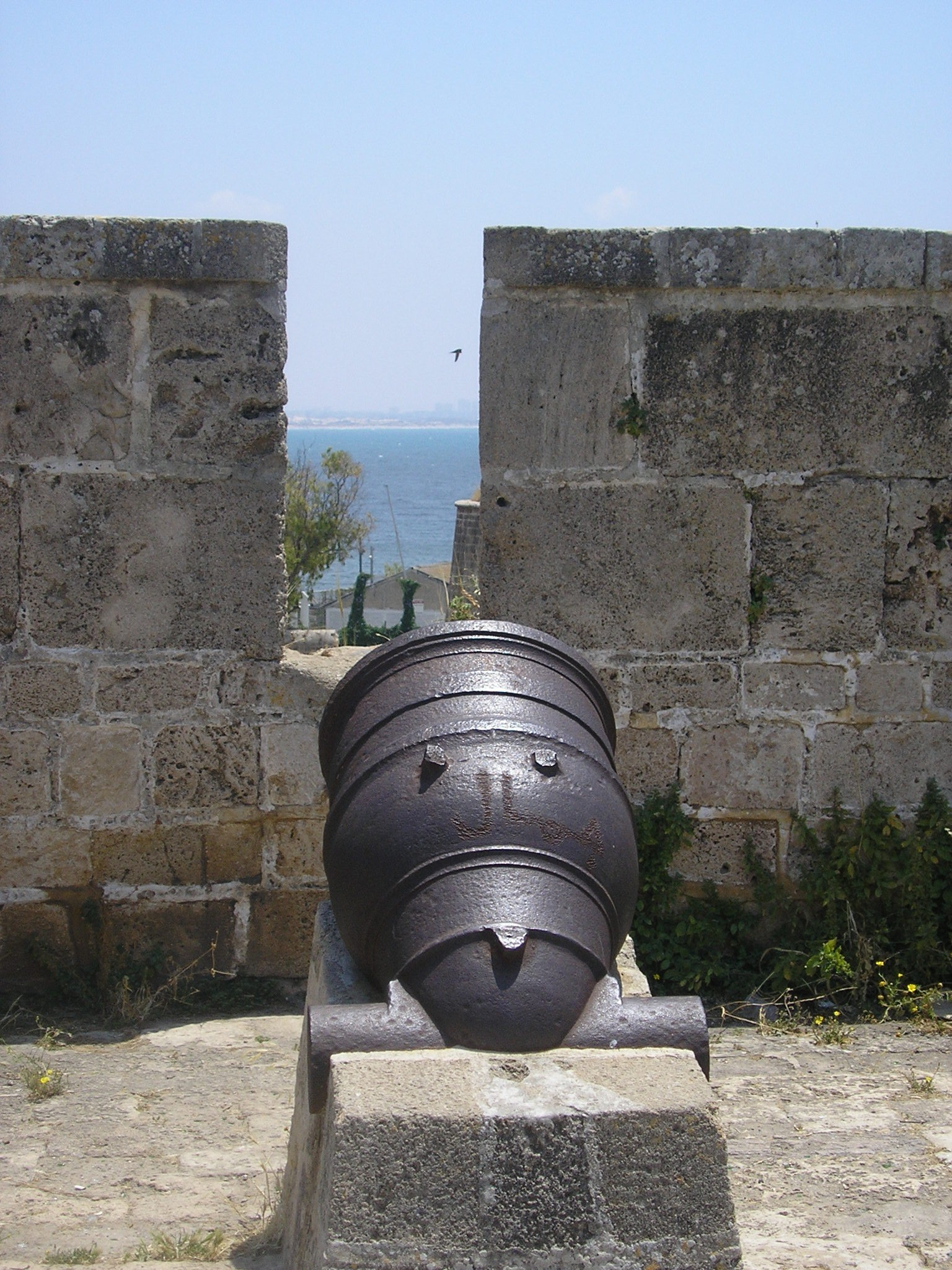 19th century mortar, in the walls of Akko (Acre), Israel.מרגמה מהמאה ה-19 בחומות עכו,ישראל.